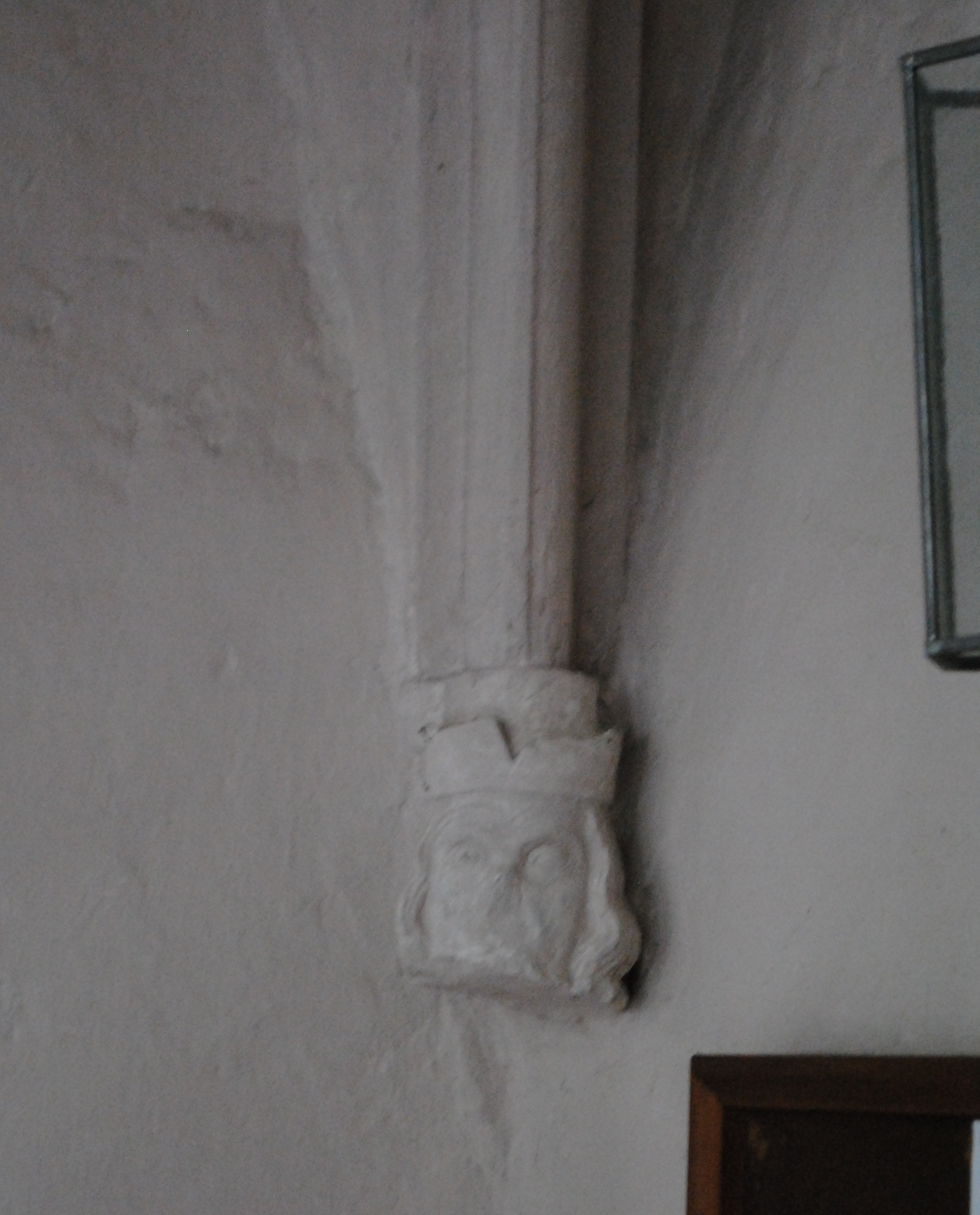 Kirche Dimbach, Volkach, Säulenaufsatz